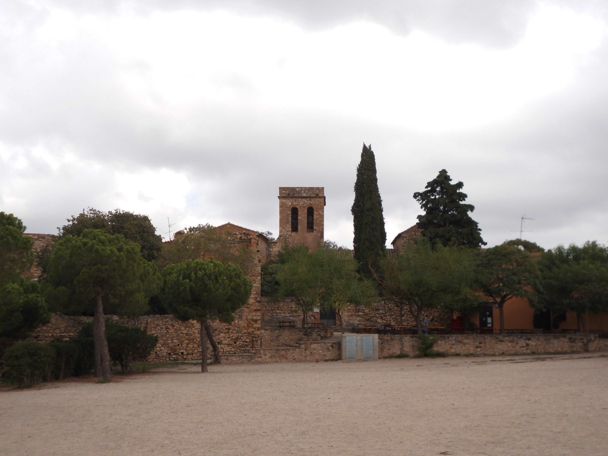 Parròquia de Santa Creu d'Olorda (Barcelona)